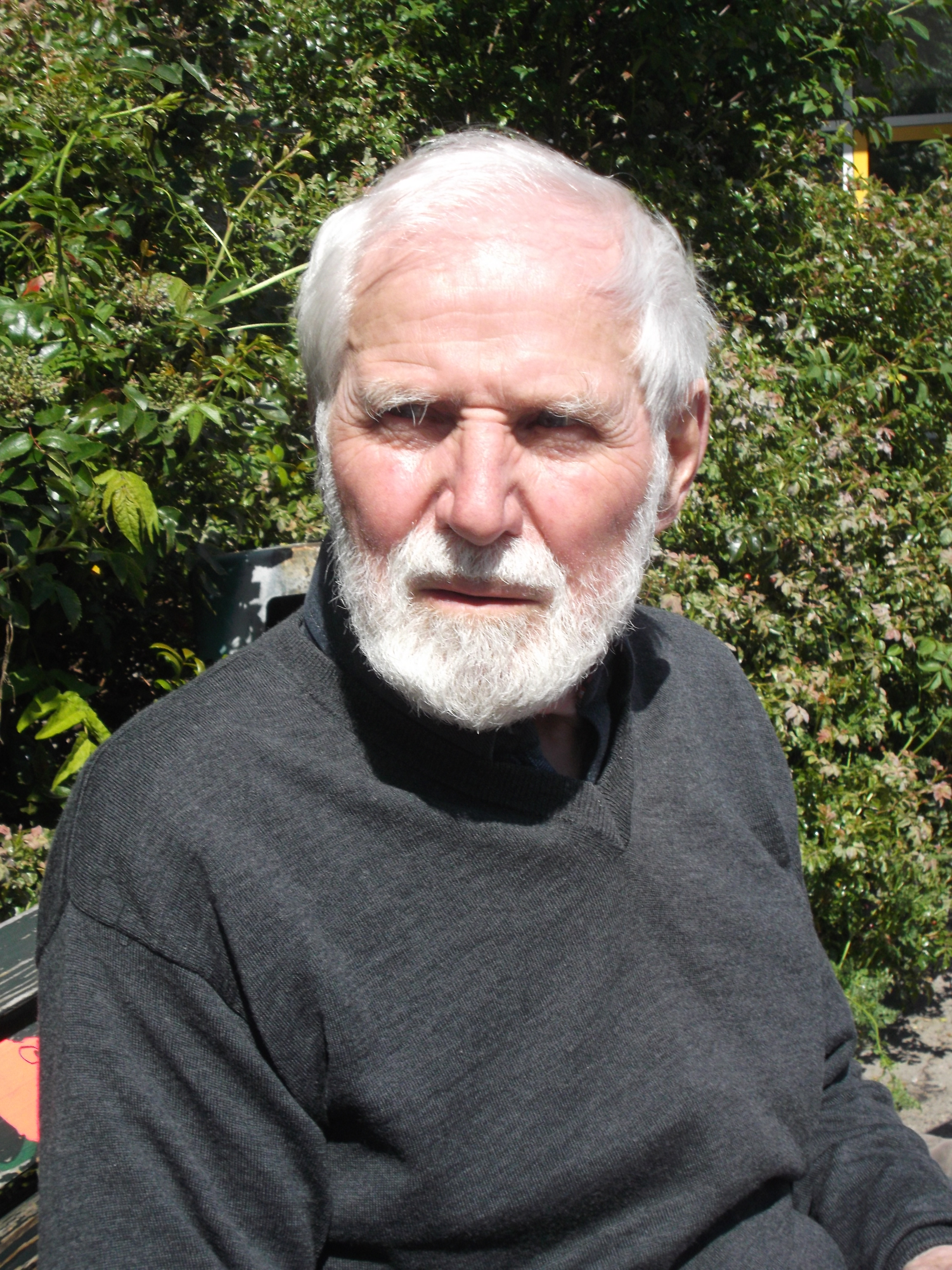 Foto